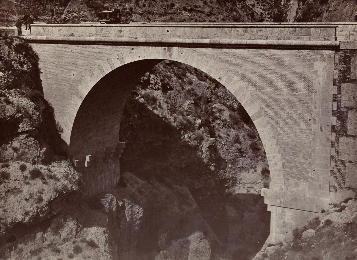 Vista del puente de Tablate nuevo por su lado sur. Tomada por José Martínez Sánchez, asociado con Juan Laurent, hacia 1867